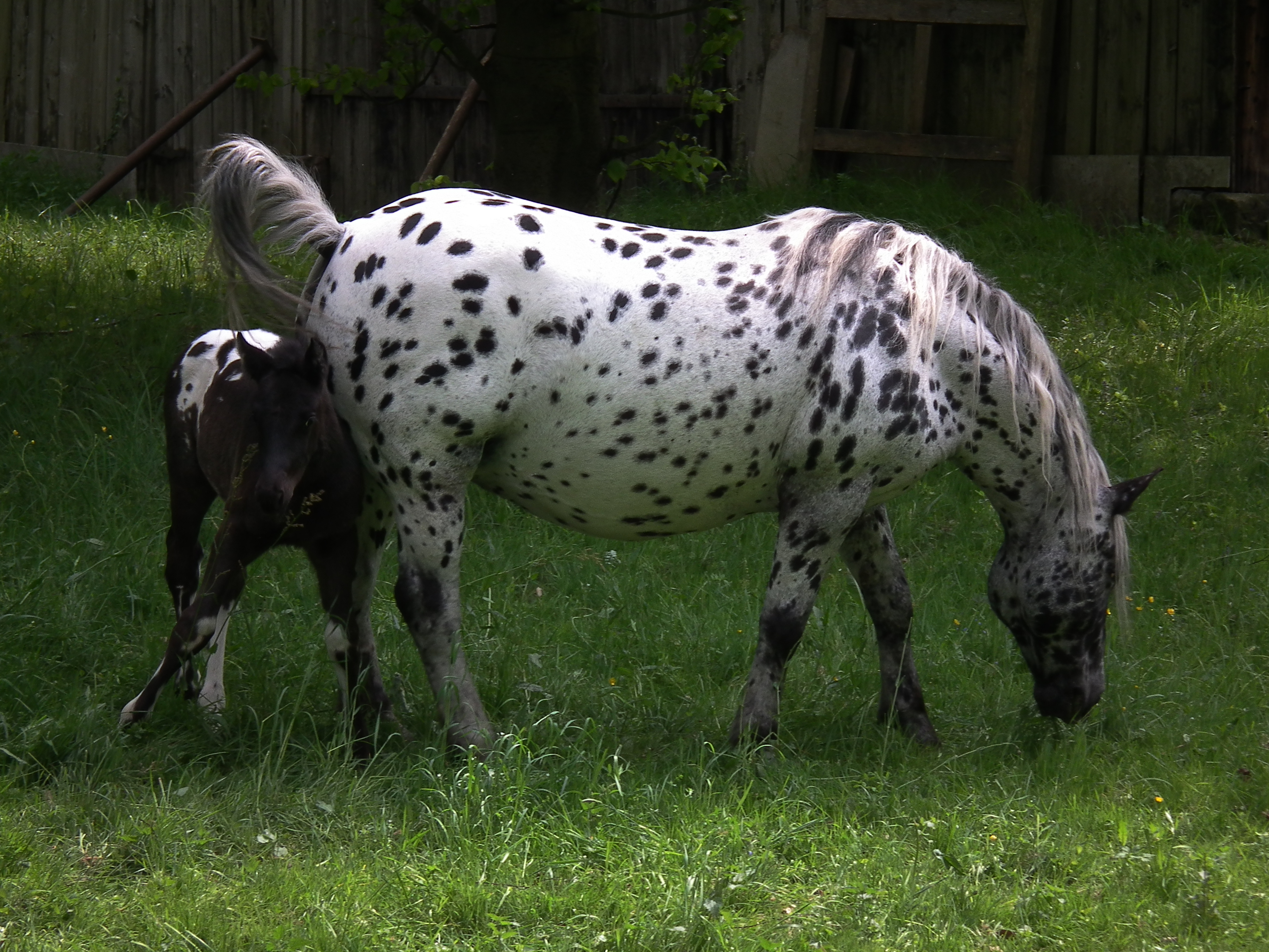 Stute mit Fohlen, fotografiert in Bretten (Baden-Württemberg, Deutschland)